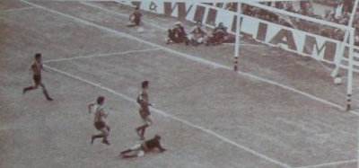 Partido del 11 de abril de 1971, Rosario Central 3-Boca Juniors 0. Gol de Miguel Ángel Bustos.